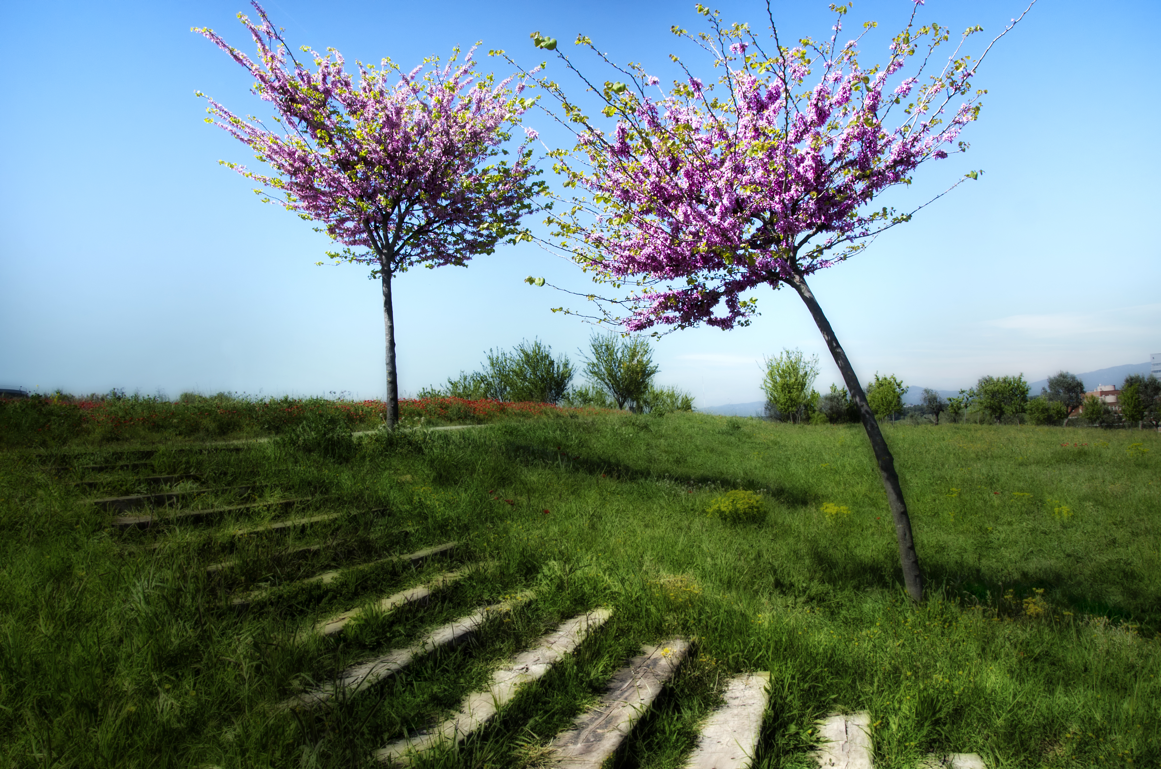 Gallecs.